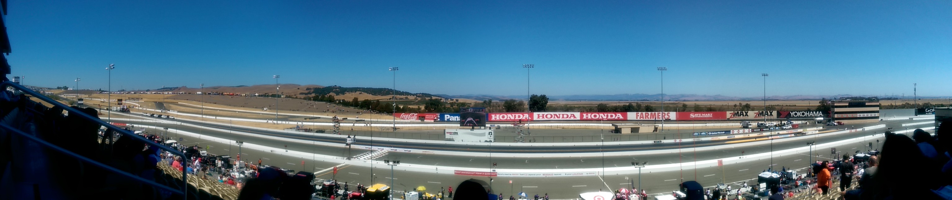 Sonoma raceway more soon